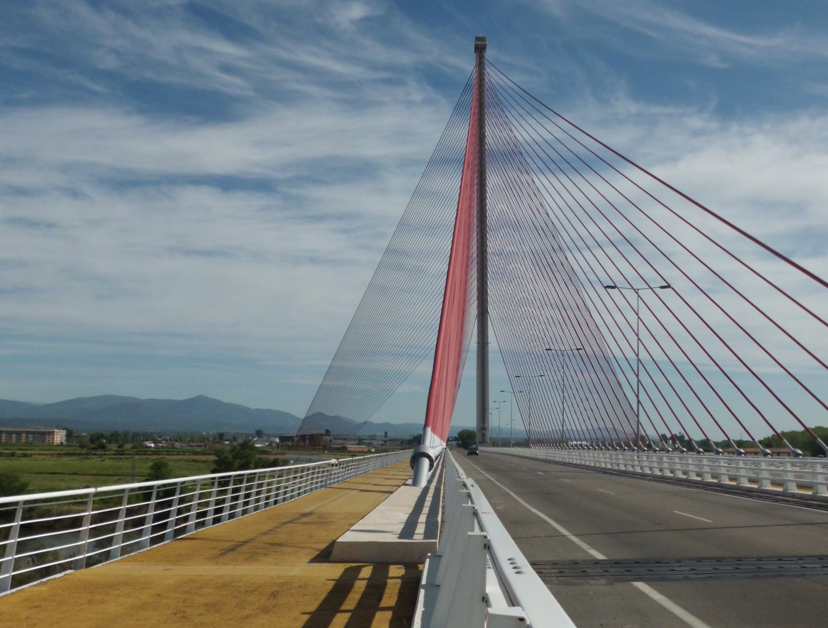 Puente de Castilla-La Mancha en Talavera de la Reina